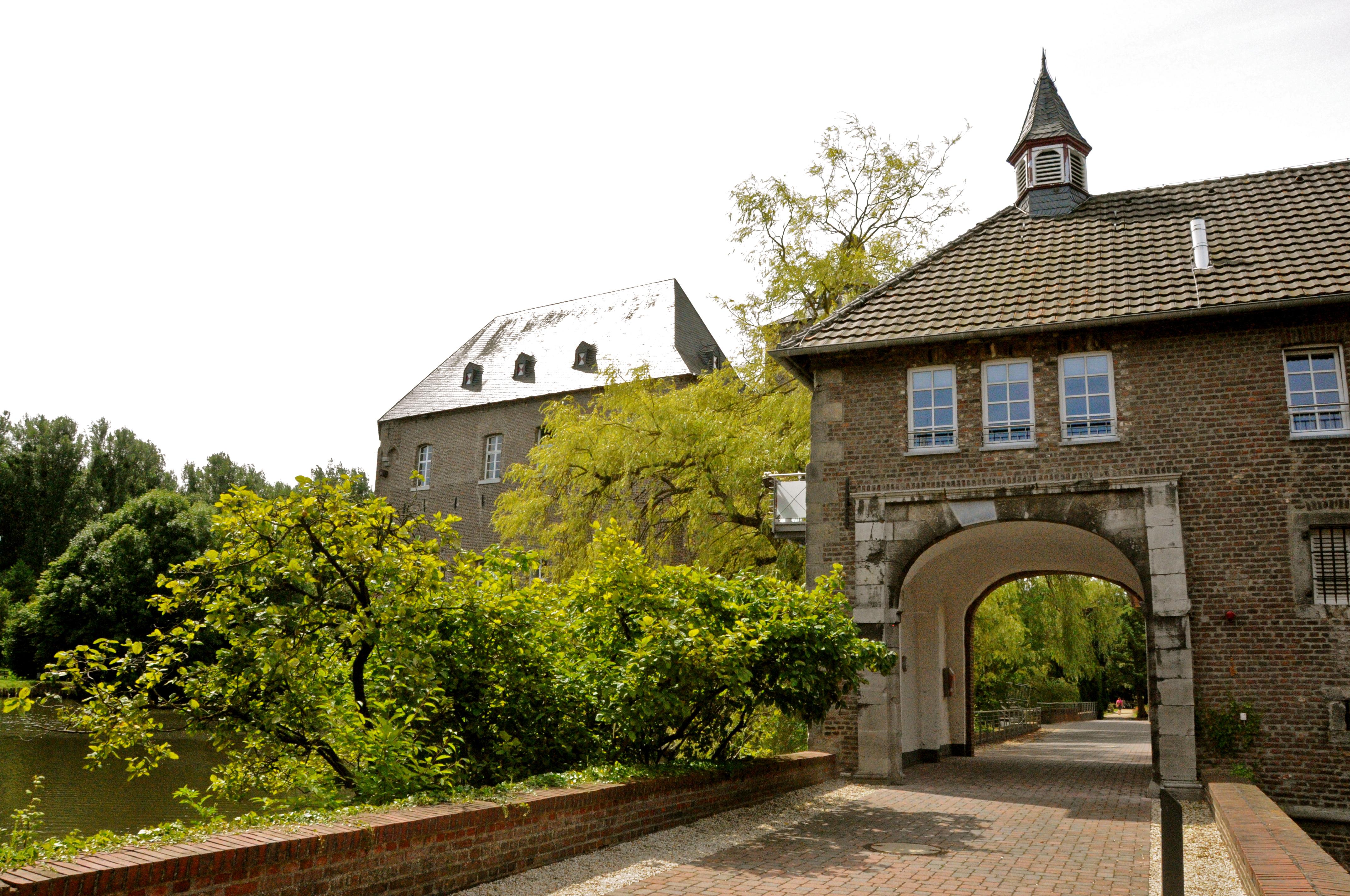 Tordurchfahrt im Nordflügel der inneren Vorburg von Schloss Trips in Geilenkirchen